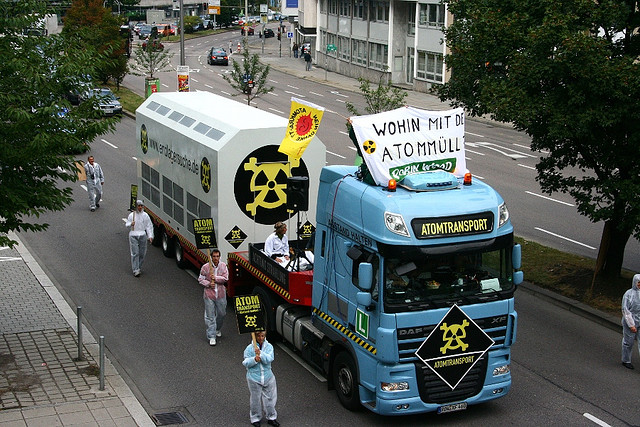 Mehrere Hundert AtomkraftgegnerInnen protestierten öffentlichkeitswirksam gegen den fortgesetzten Betrieb von Atomkraftwerken. Ein als Castor-Transport aufgemachter Lkw der Internet-Initiative Campact rollte in die Stuttgarter Innenstadt. Viele als Forscher verkleidete AtomkraftgegnerInnen begleiteten ihn und machten sich auf die Suche nach einem Endlager für den atomaren Müll. Robin-Wood-AktivistInnen erkletterten kurz nach dem Start des Castors den Transporter und „besetzten“ ihn. – [1]